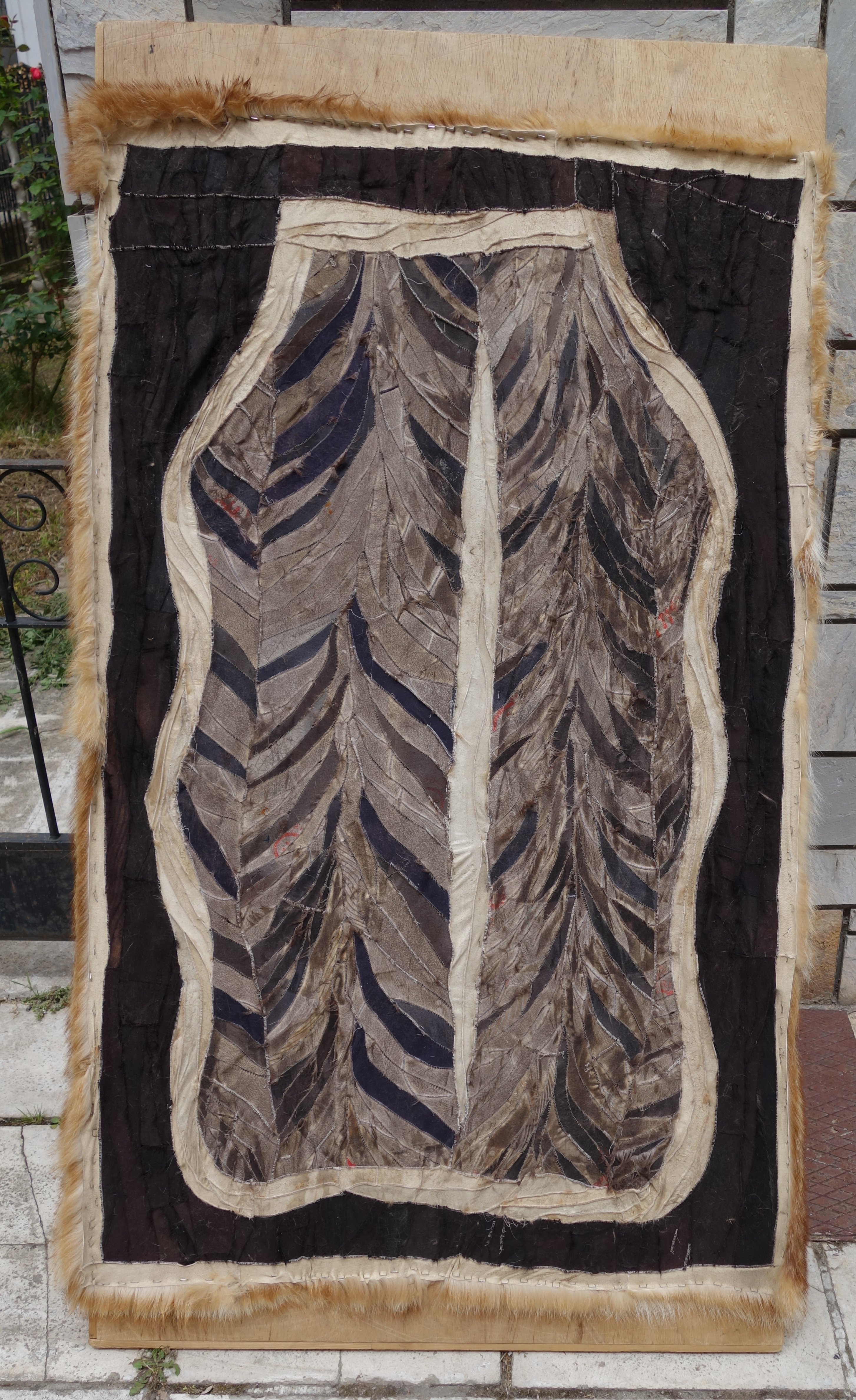 Kürschner in der Präfektur Kastoria, Griechenland. Aufgezweckter Fellvorleger. Siehe auch Kürschner in der Stadt Kastoria und Kürschner in der Stadt Siatista.